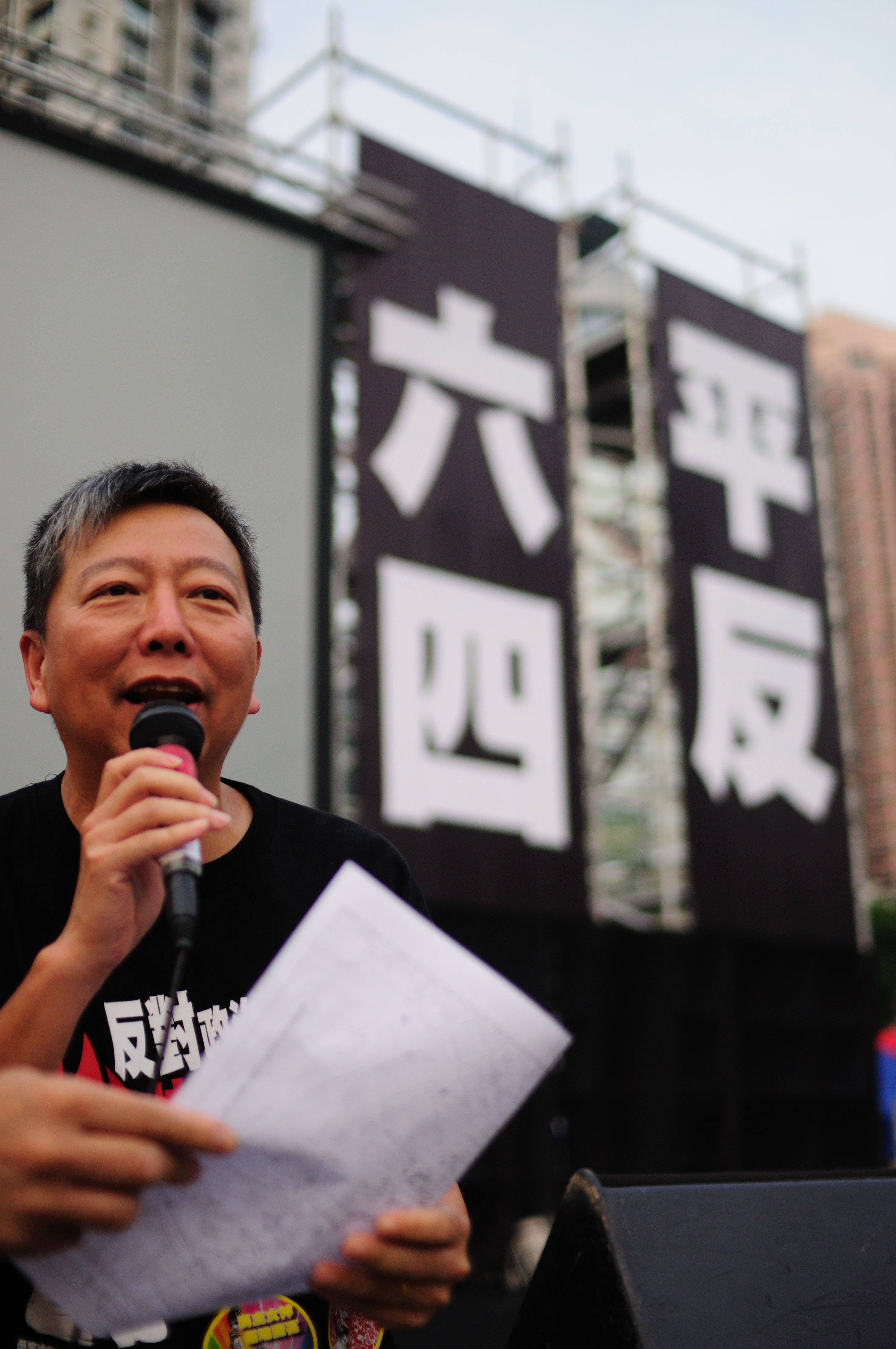 李卓人 維園平反六四21週年燭光晚會 2010